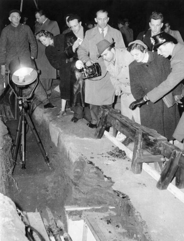 Zentralbild/Junge 24.4.1956 USA-Spionage Tunnel unter DDR-Gebiet Der amtierende Militärkommandant des sowjetischen Sektors von Berlin, Oberst Kozjuba, gab am Montagabend (23.4.56) auf einer Pressekonferenz vor zahlreichen in- und ausländischen Journalisten bekannt, dass am 22.4.1956 von sowjetischen Truppen eine amerikanische Abhörzentrale im demokratischen Sektor Berlins ausgehoben wurde. Amerikanische Stellen hatten im Gebiet von Alt-Glienicke einen etwa 300 m langen Stollen angelegt, der zu den Fernmeldelinien der sowjetischen Truppen sowie zu den Fernmeldelinien der Deutschen Demokratischen Republik lief. Durch den Stollen ziehen sich Kabelleitungen, die vom amerikanischen Sektor ausgehen und an die Kabelleitungen der sowjetischen Truppen angeschlossen wurden. Im Anschluß an die Pressekonferenz fand eine Besichtigung der amerikanischen Abhörzentrale statt. UBz.: Vertreter der internationalen Presse besichtigen die Anzapfstelle im Stollen.